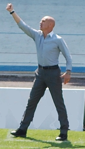 L'allenatore del Varese 1910 durante una partita di calcio